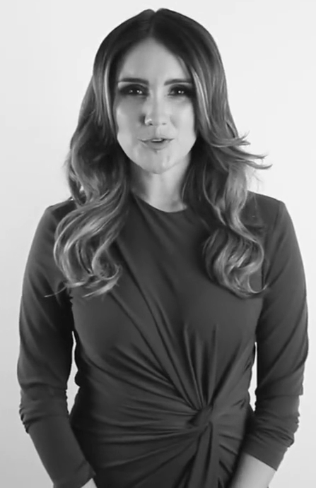 Dulce María - Viva Con Glamour